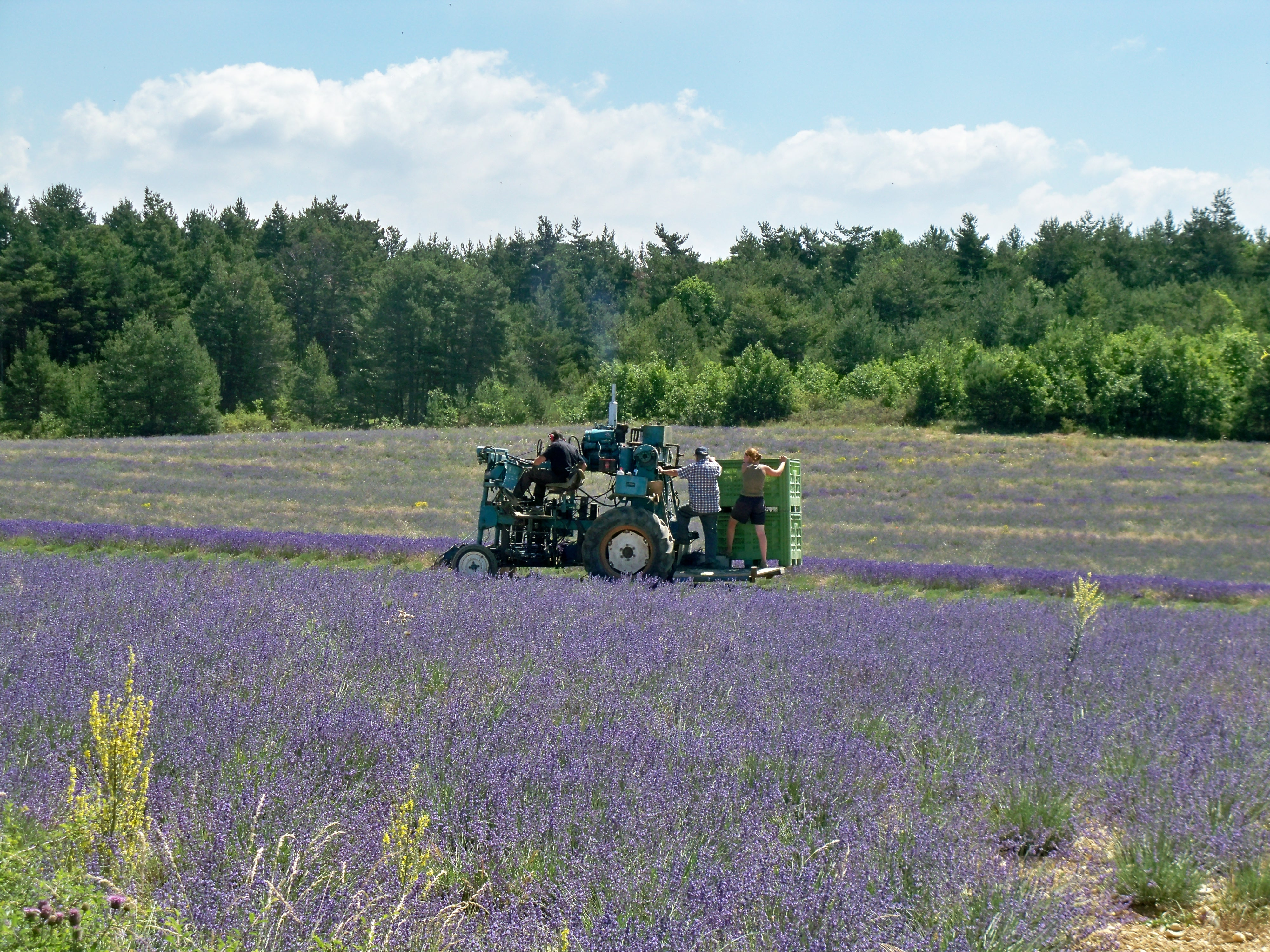 Machine à récolter la lavande, sur le plateau d'Albion